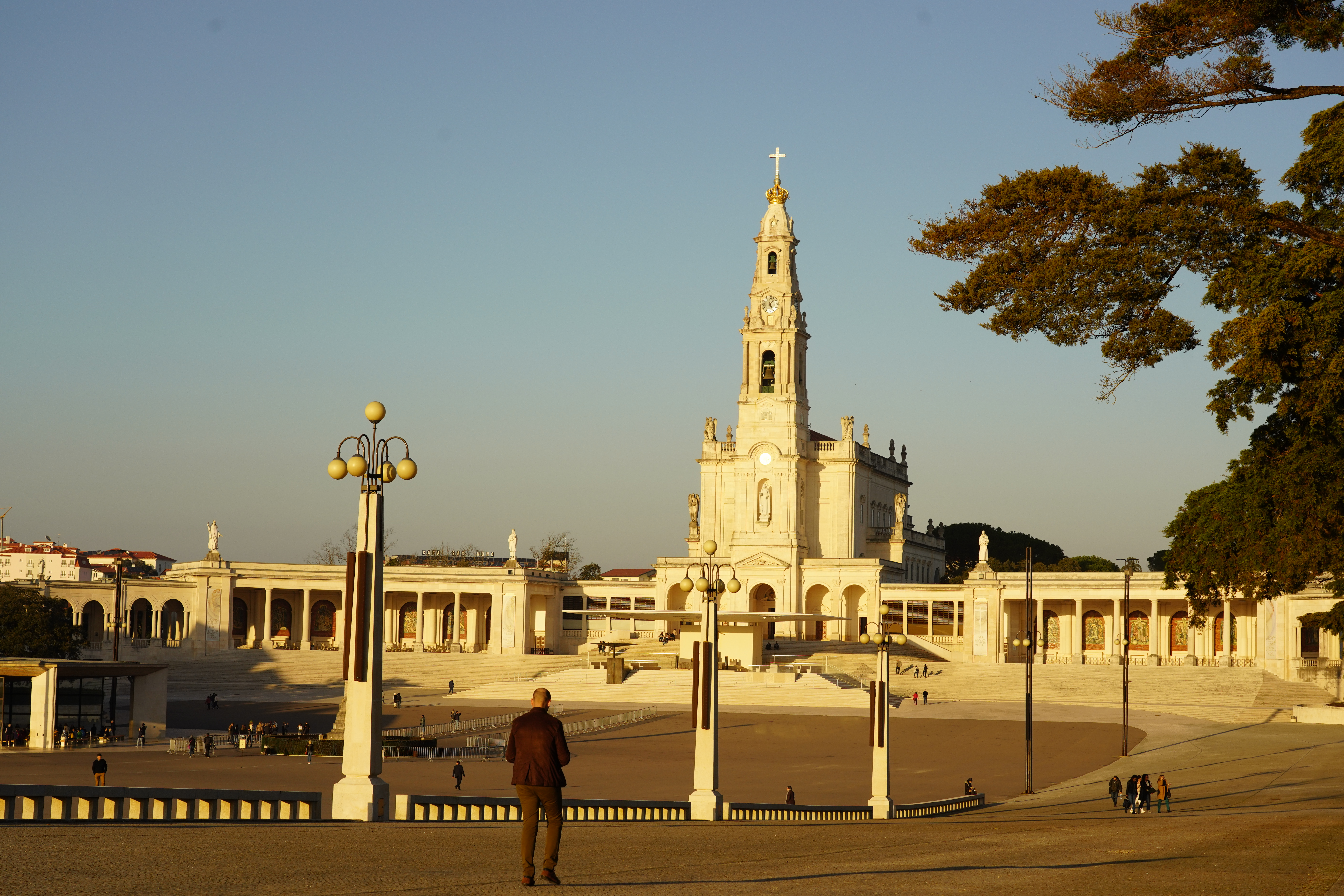 20200204_ShrineFatima_6540